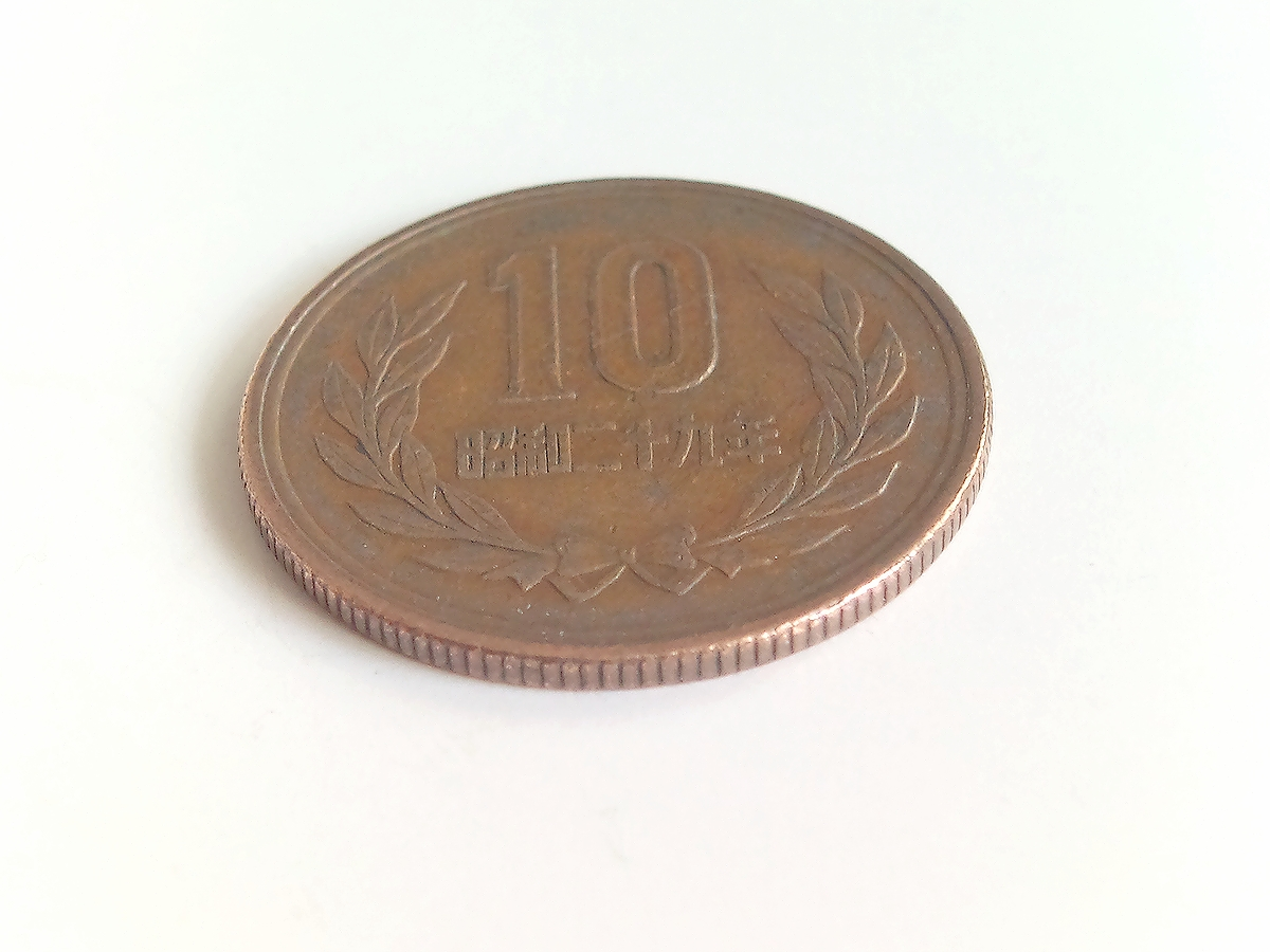 昭和29年製ギザ10